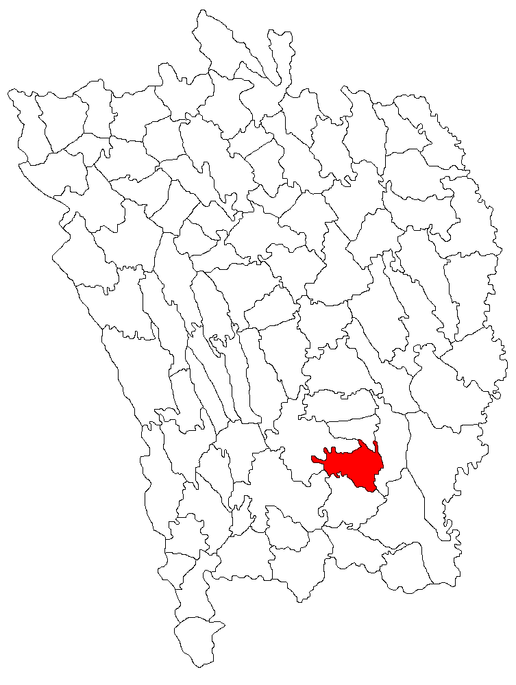 Categorie:Hărţi ale judeţului Vaslui